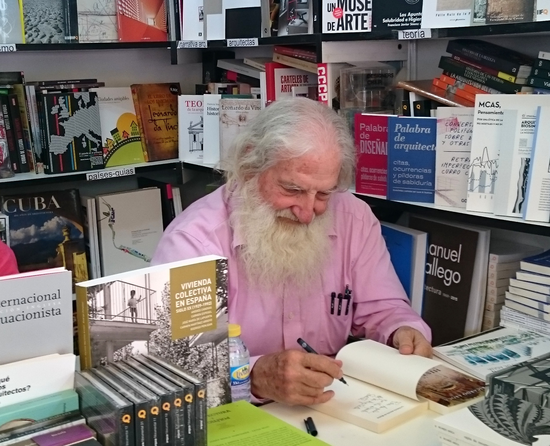 Ricardo Aroca en la Feria del Libro de Madrid de 2016